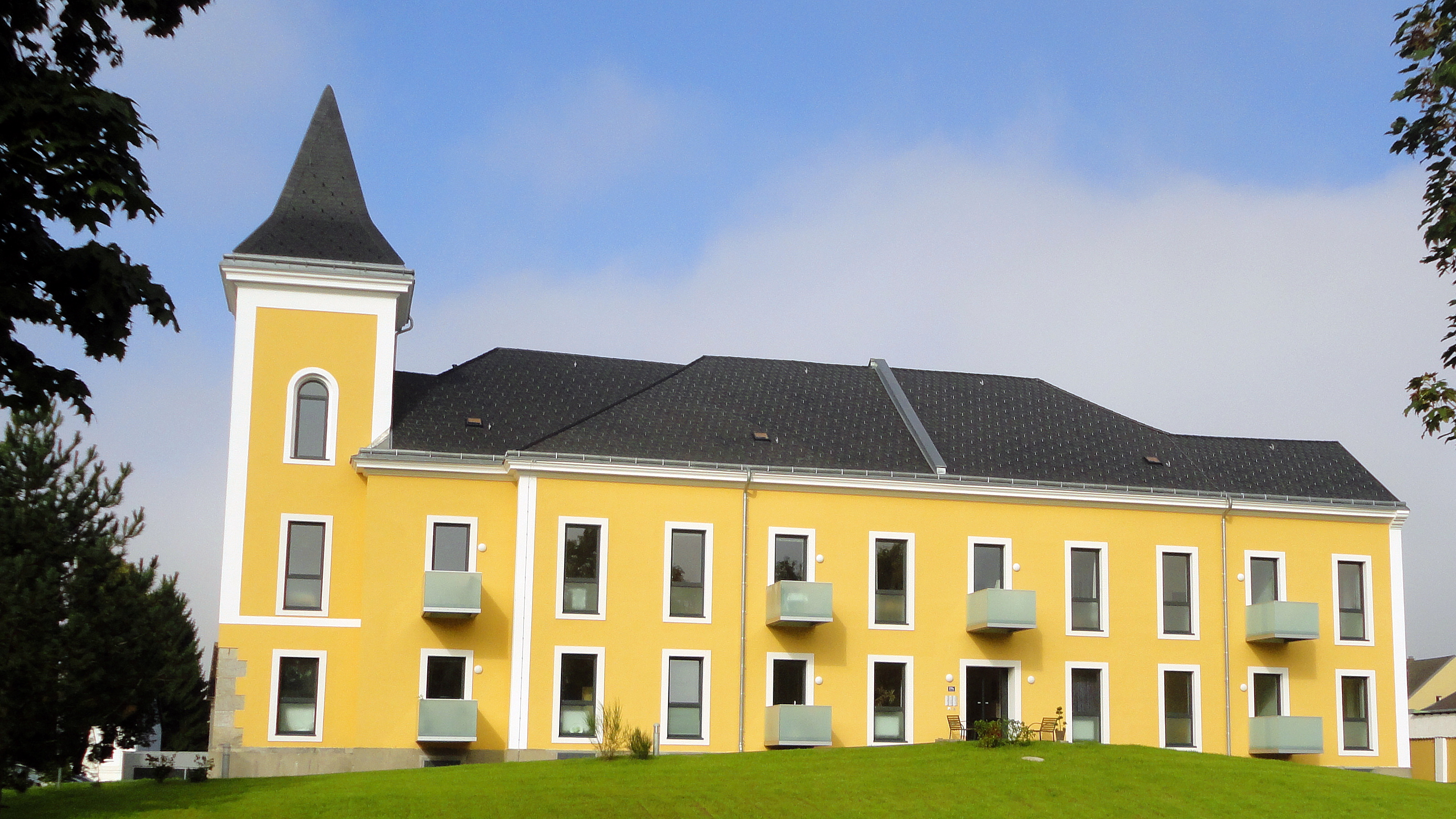 Ehemaliges Schloss Kinsky in Freistadt, renoviert und adaptiert als Seniorenwohnheim (2014).